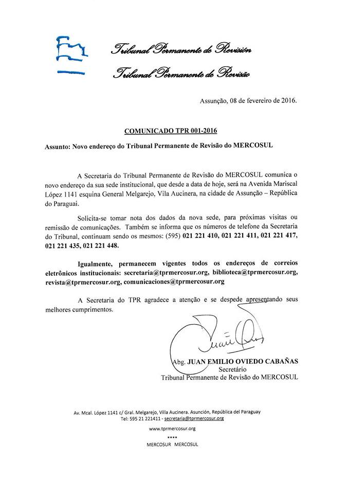 Documento que anuncia a mudança de sede do Tribunal Permanente de Revisão do Mercosul.